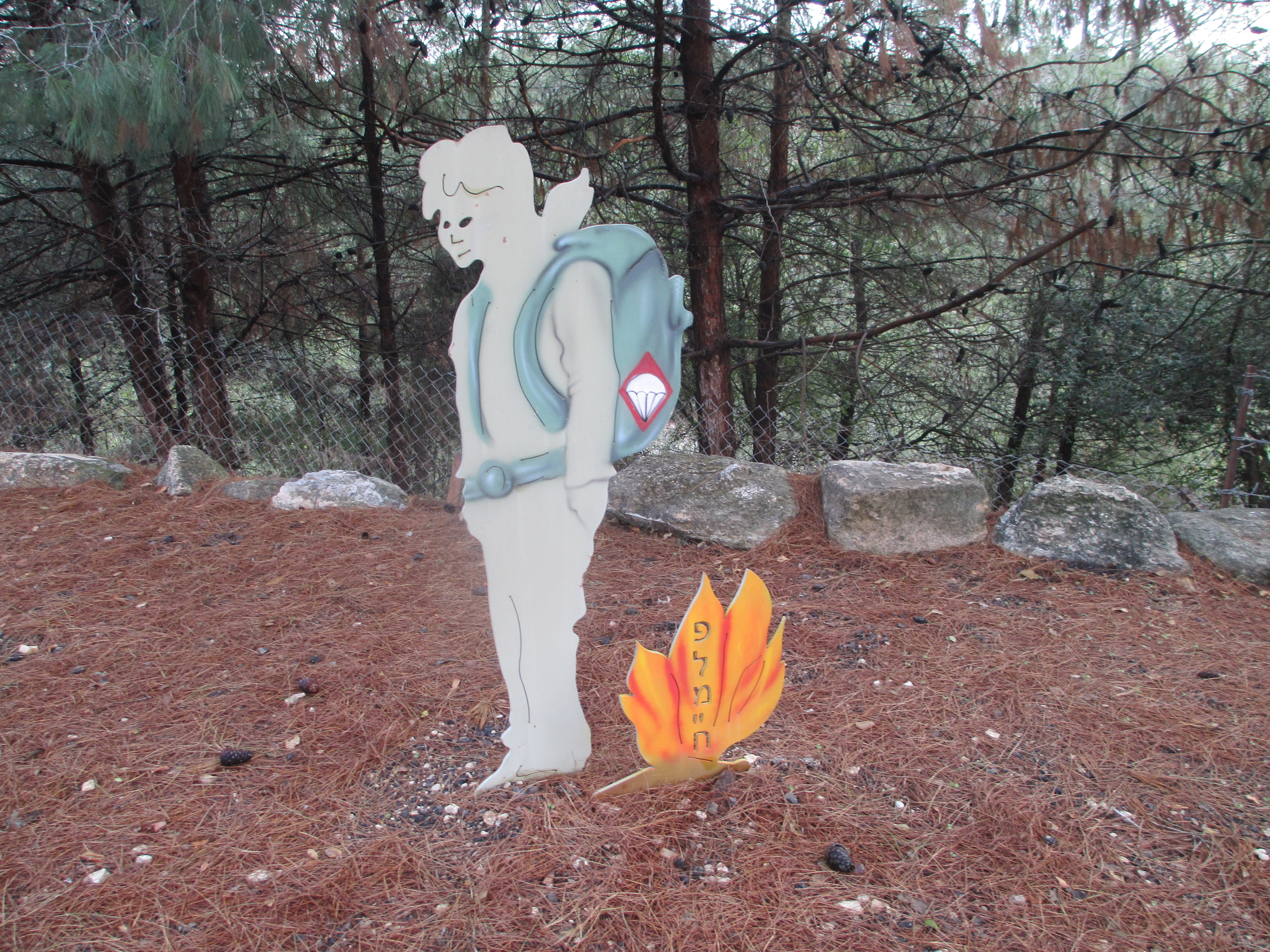 פסל מדורות הפלמ"ח - מחלקת הצנחנים